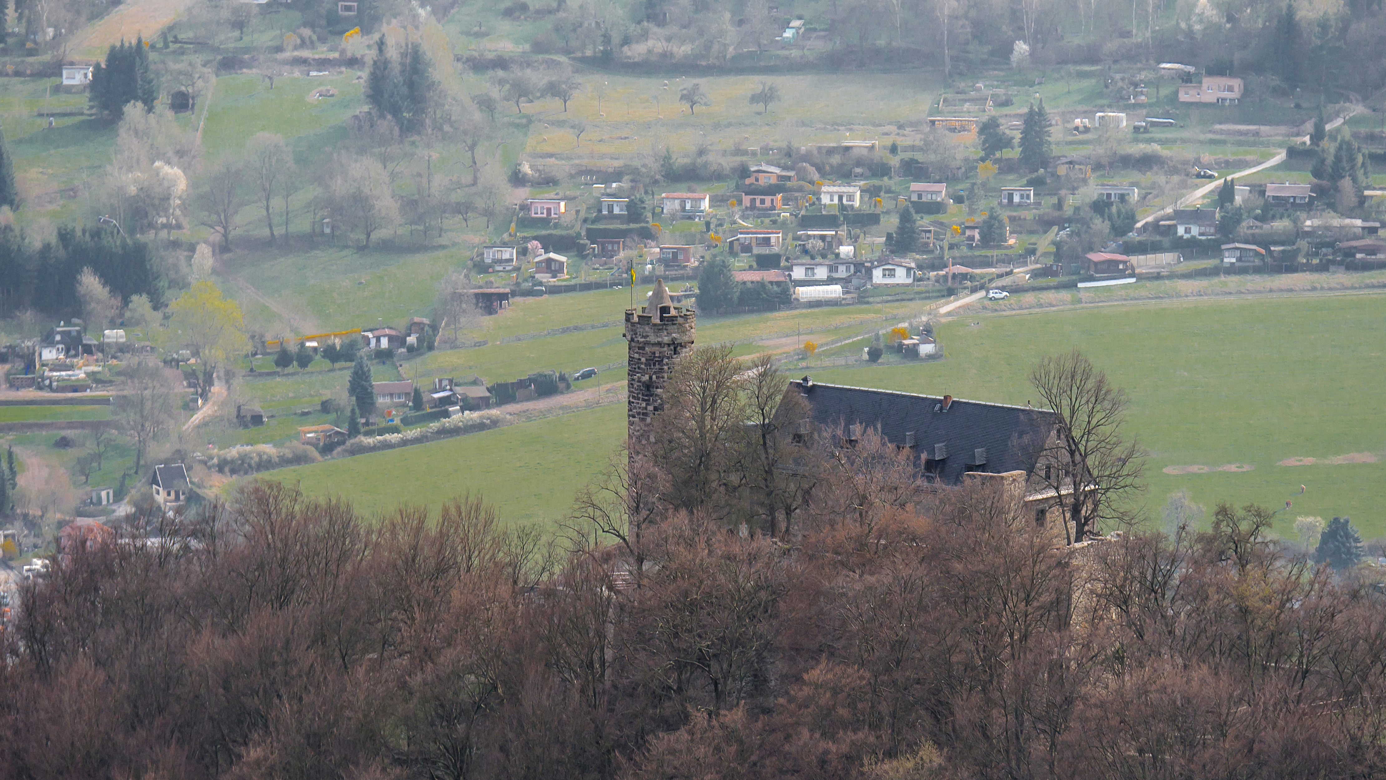 (NSG Nr. 158)Naturschutzgebiete in Thüringen Burg Greifenstein Bad Blankenburg,die Lage der Burg aus nördlicher Richtung